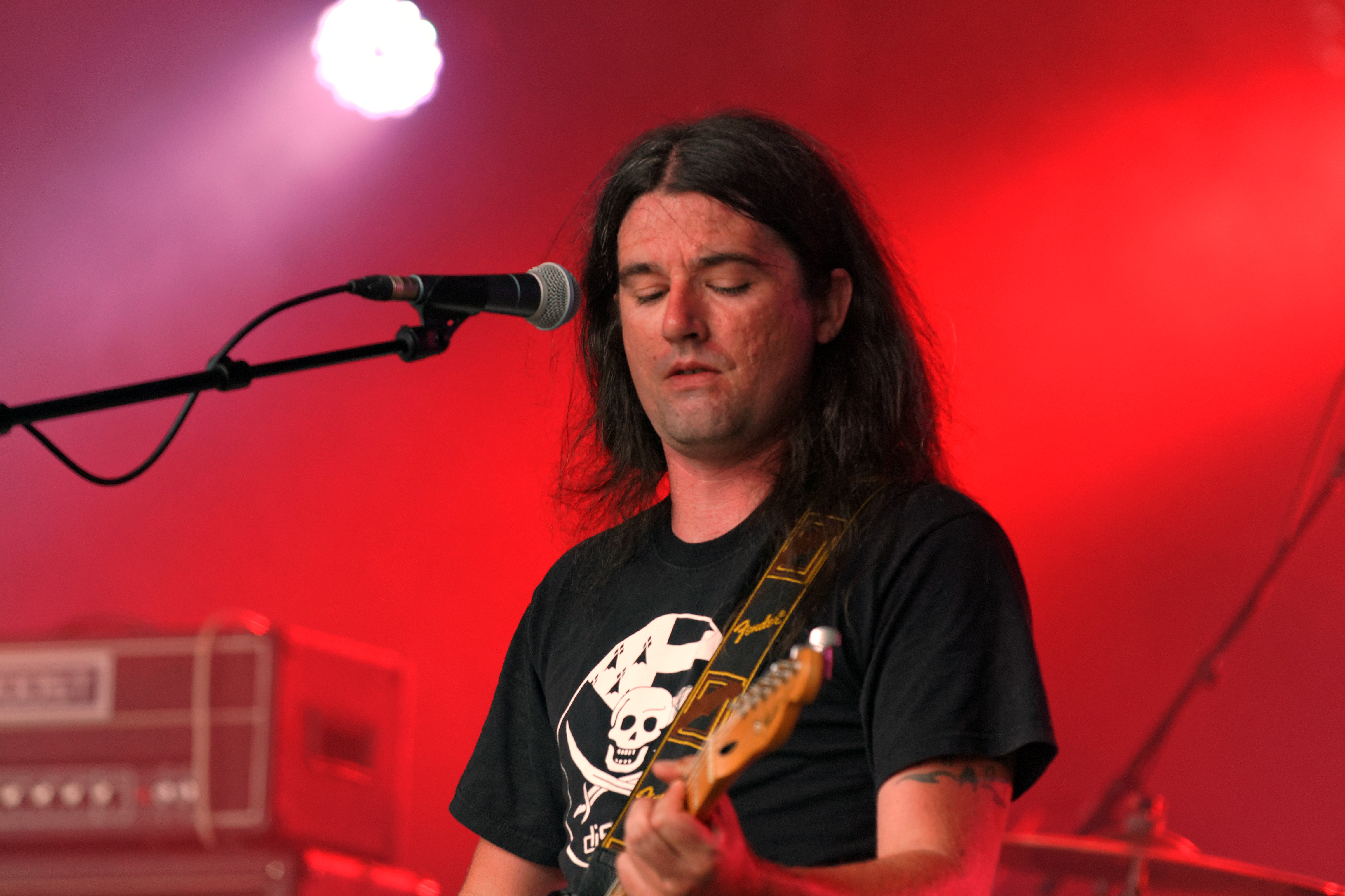 Brieg Guerveno en concert à l'espace Pierre-Jakez Hélias lors du festival de Cornouaille le 23 juillet 2014.